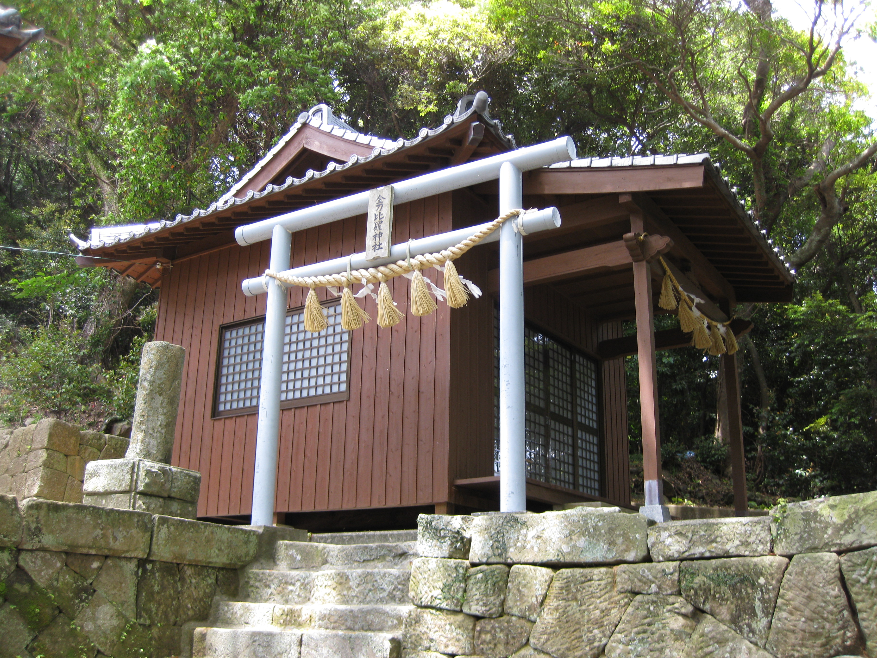 新上五島町浜ノ浦郷 天満神社